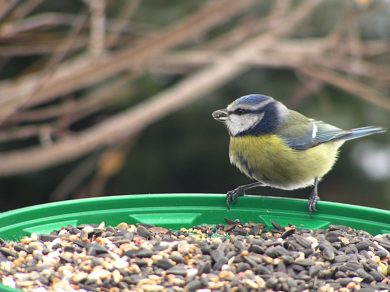 Blue Tit Parus caeruleus, Bytom, Poland